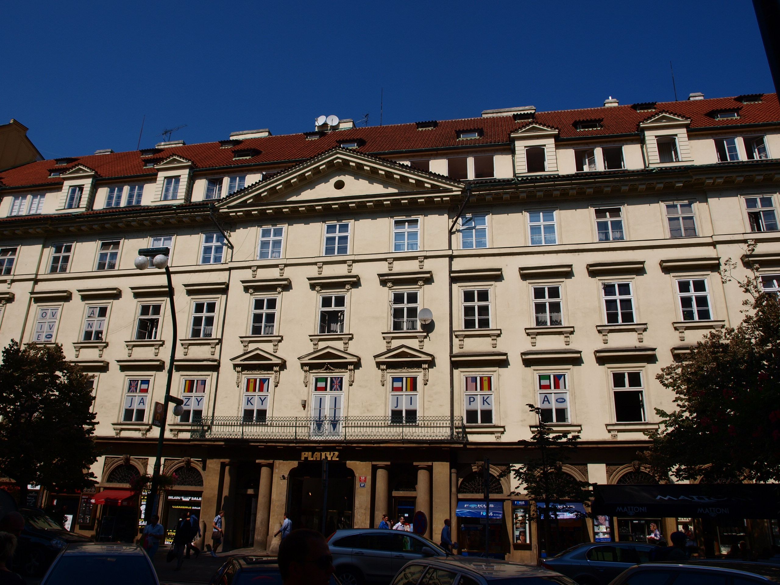 Palác Platýz